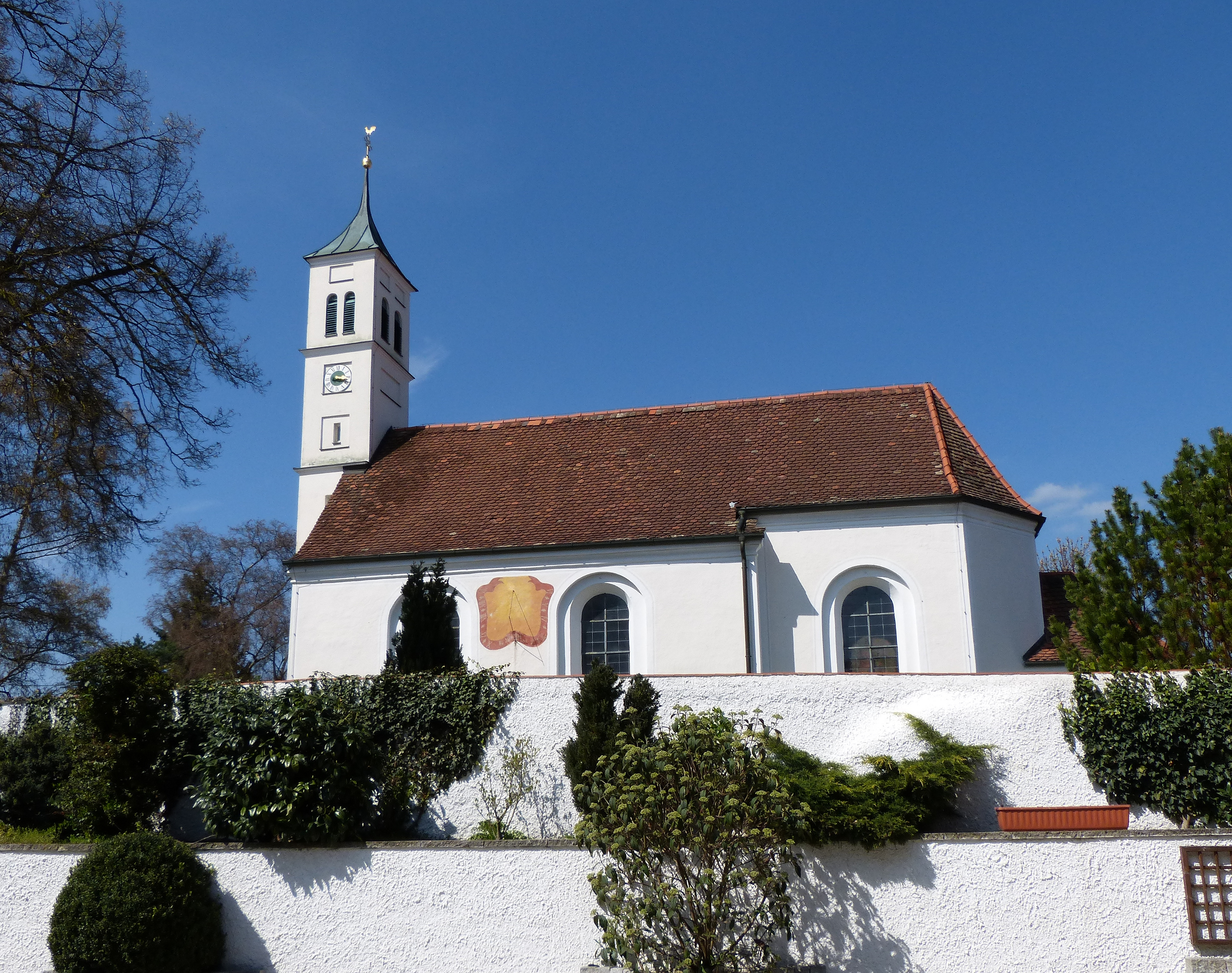 Wörthsee, OT Etterschlag, Inninger Straße 1. Die katholische Filialkirche St. Nikolaus wurde 1758 auf älterer Grundlage neu erbaut. This is a photograph of an architectural monument.